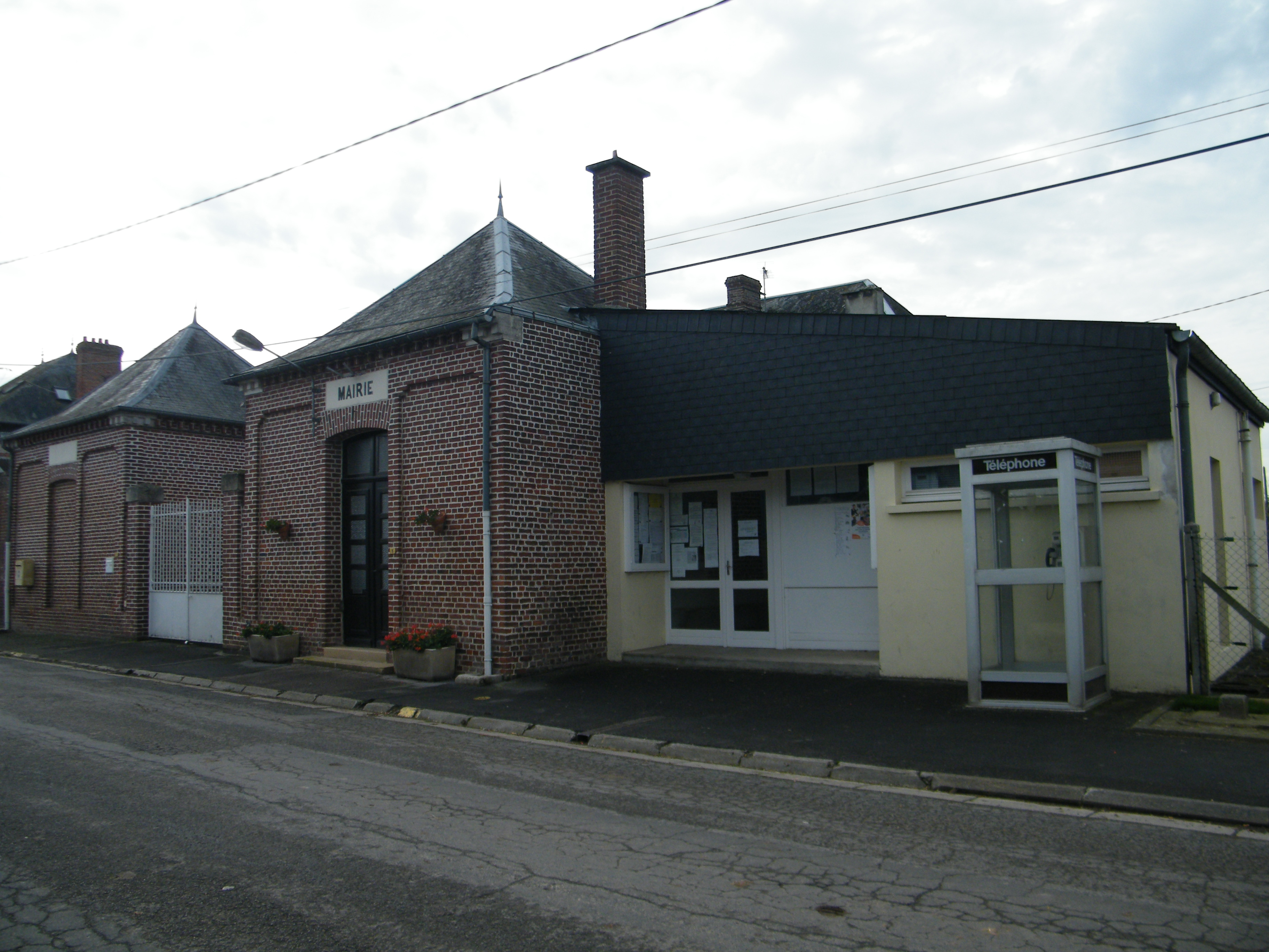 Bâtiments communaux.